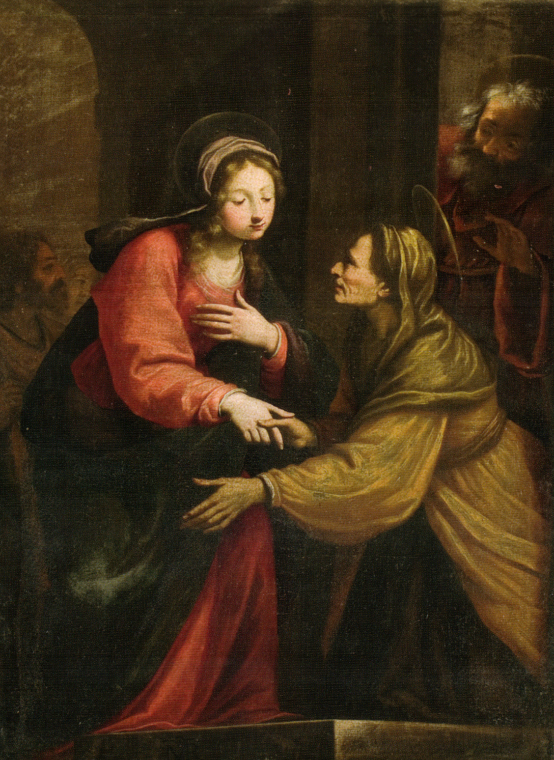 Visitationlabel QS:Lit,"visitazione" label QS:Lde,"Heimsuchung" label QS:Len,"Visitation"